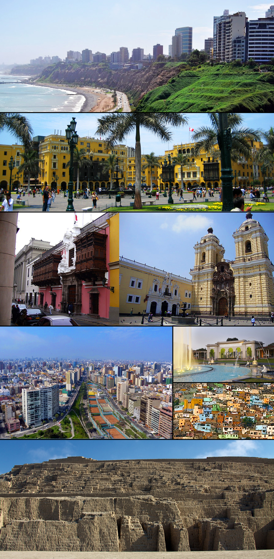 Composición de фото de la ciudad de Lima, Perú. De arriba a abajo: La Costa Verde, desde la quebrada de Armendáriz; Plaza Mayor de Lima, (Centro Histórico); Palacio de Torre Tagle edificado en el siglo XVIII, (Centro Histórico); convento de Сан-Франциско el Grande (Siglo XVII, Centro Histórico); Vista aérea de Miraflores desde la Bajada Balta; Parque de la Reserva (Santa Beatriz); Viviendas populares en el Cerro San Cristóbal (Rímac); Ruinas de la Huaca Pucllana edificada entre los siglos III y V por la Cultura Lima (Miraflores